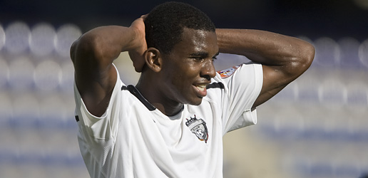 Willy pelo Real Esppor